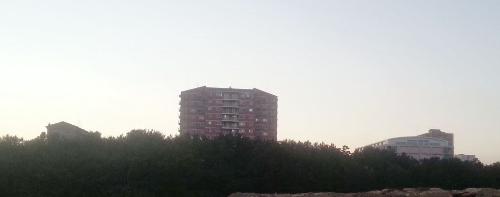 포항대학교 전경